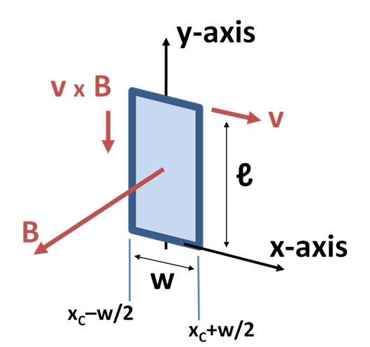 Faraday's law